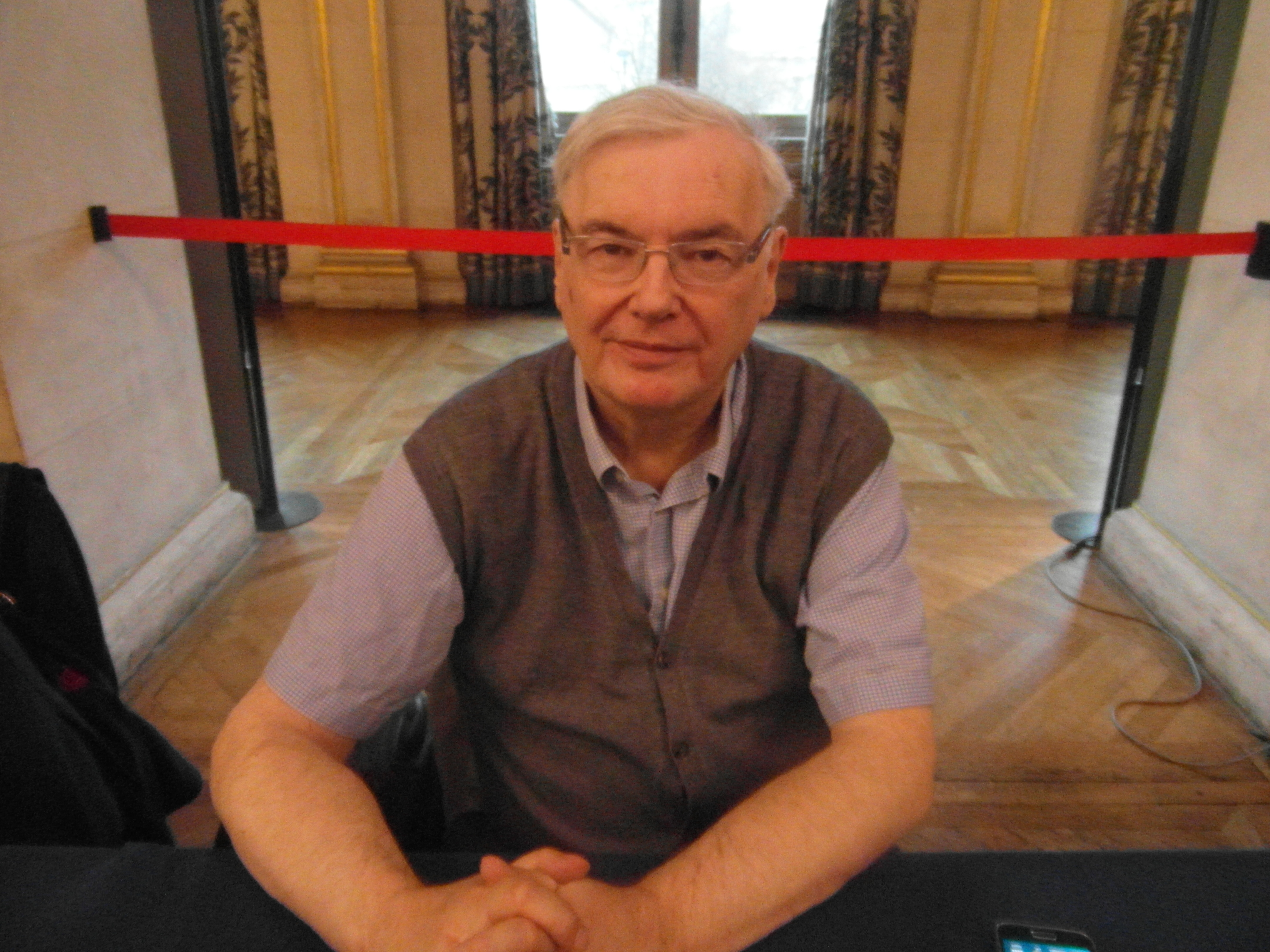 22e Maghreb des Livres, 13 et 14 février 2016